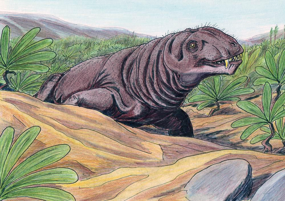 ДейтерозаврLatina: Deuterosaurus